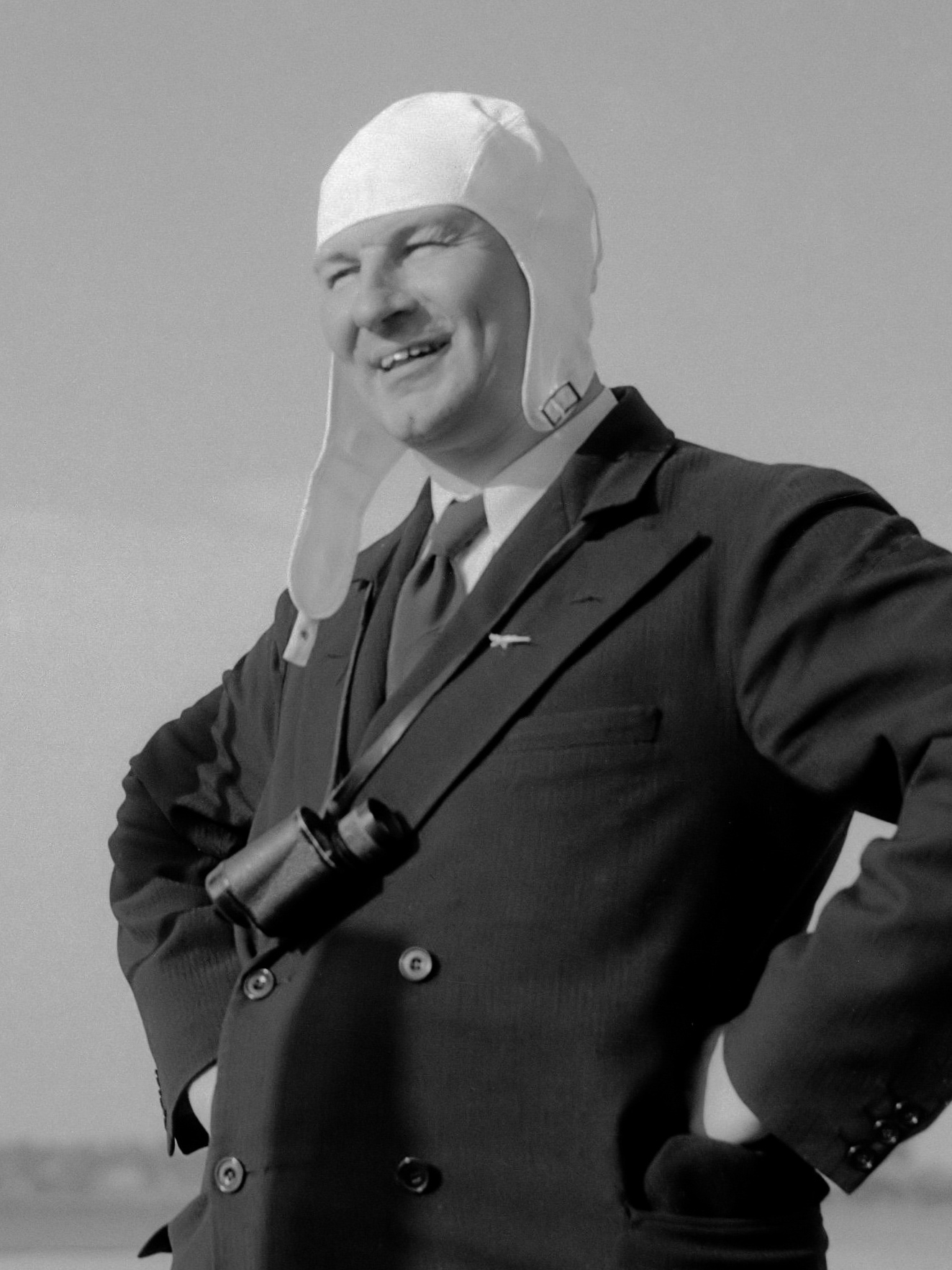 Anthony Fokker met vliegenierskap en verrekijker bij microfoon op luchthaven Schiphol